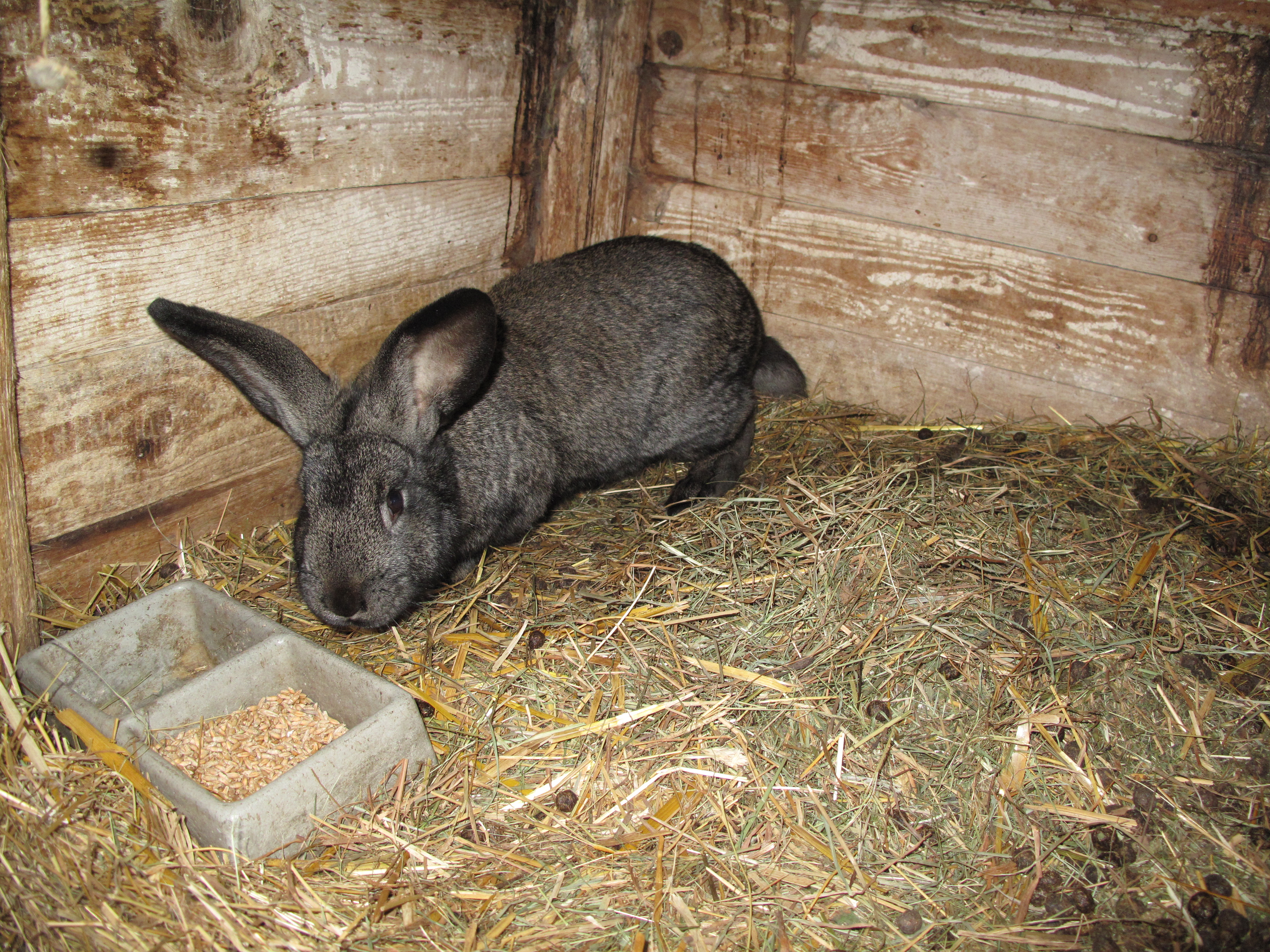 Králík